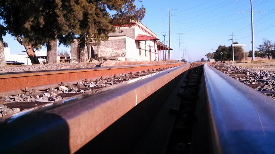 Antigua Estación de tren Zacatelco